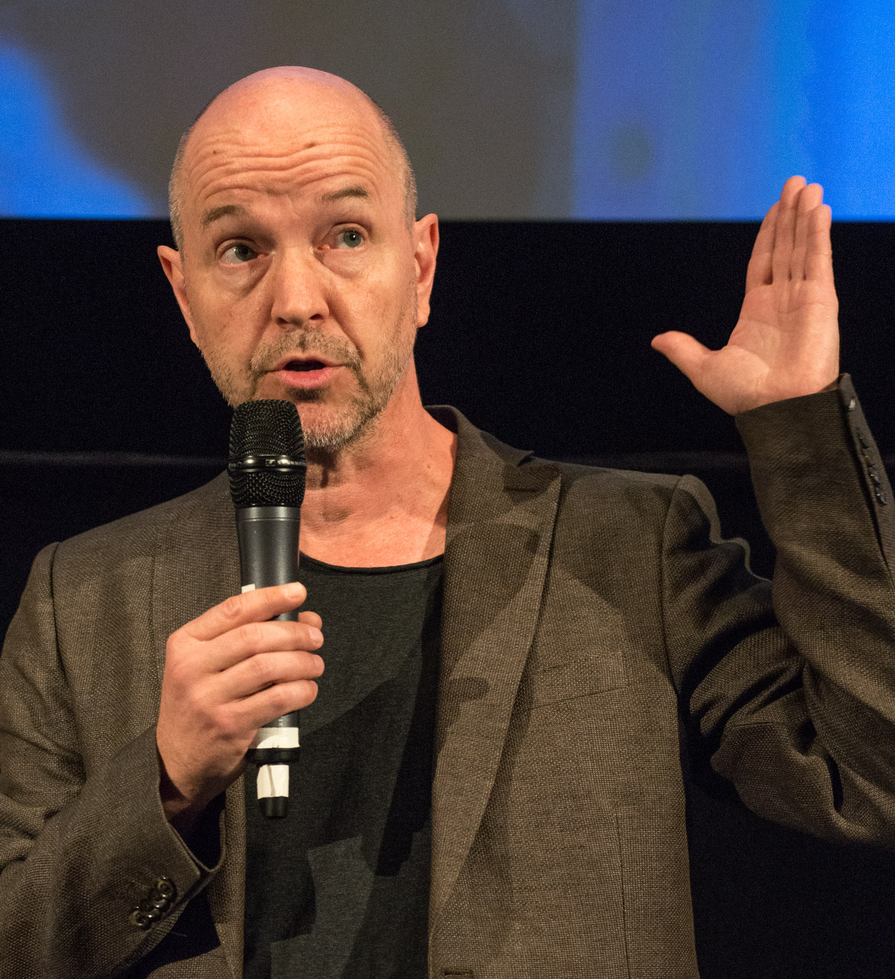 Gellert Tamas under presentationen av den Svenska filmhösten i Filmhuset i Stockholm den 17 augusti 2015.